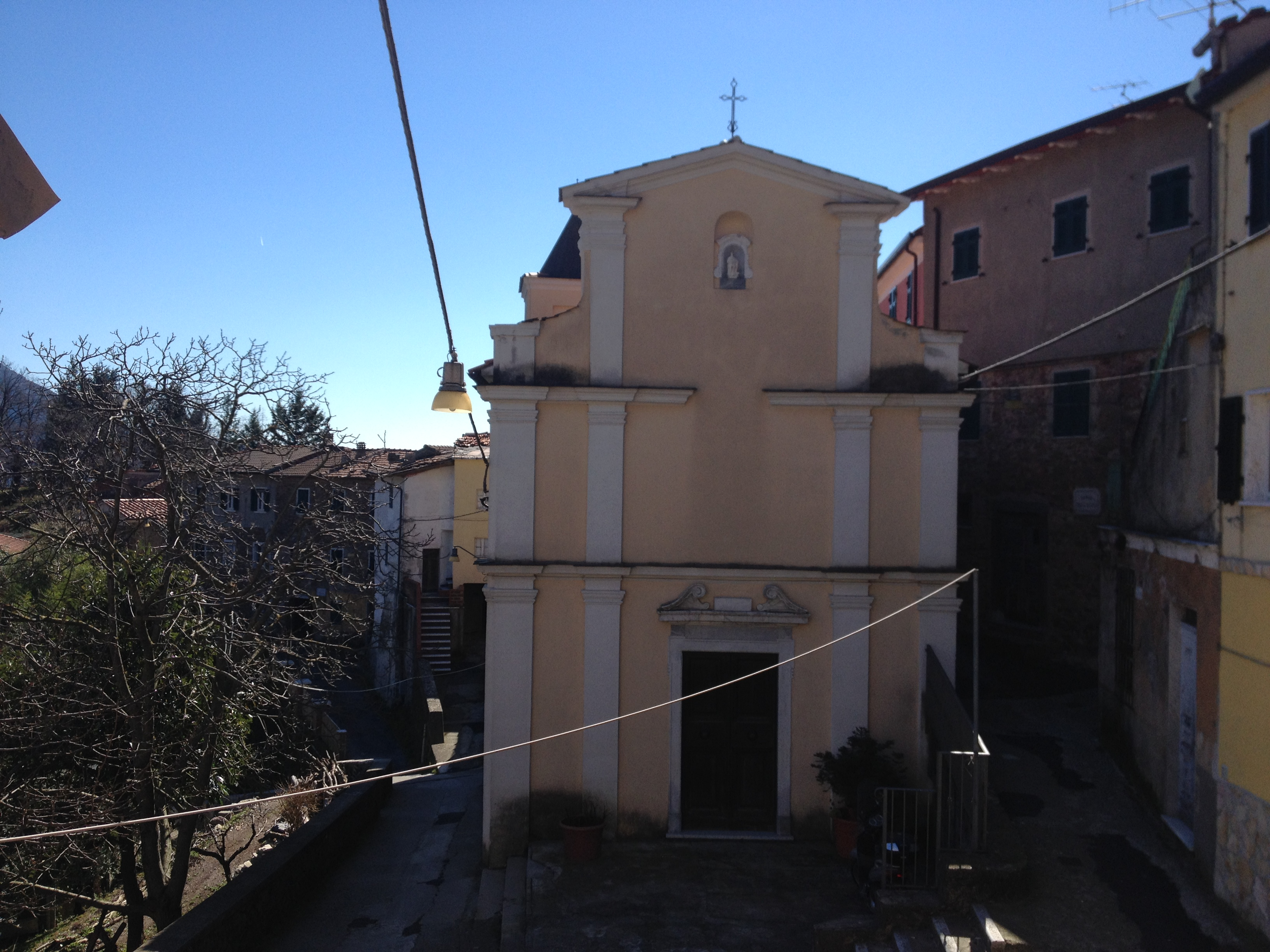 sculpture church